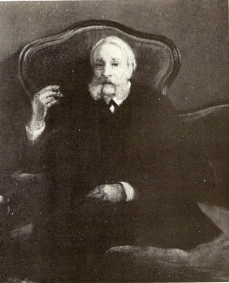 Porträt des Apothekers Theodor Schorer (1836-1918), Besitzer der Löwen-Apotheke in Lübeck, gemalt von seiner TochterMaria Slavona. Familienbesitz.